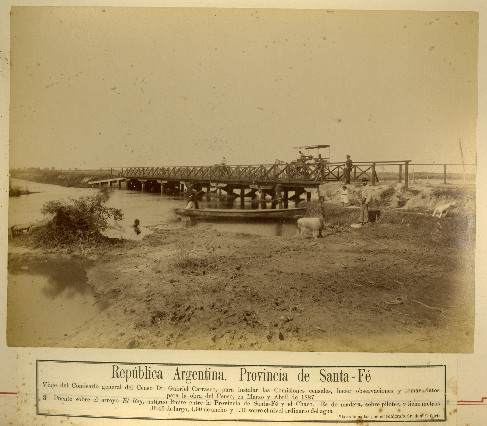 Antiguo límite entre la Provincia de Santa Fe y el Chaco. Es de madera, sobre pilotes y tiene metros 36.40 de largo, 4.90 de ancho y 1.30 sobre el nivel ordinario del agua. Nº 3